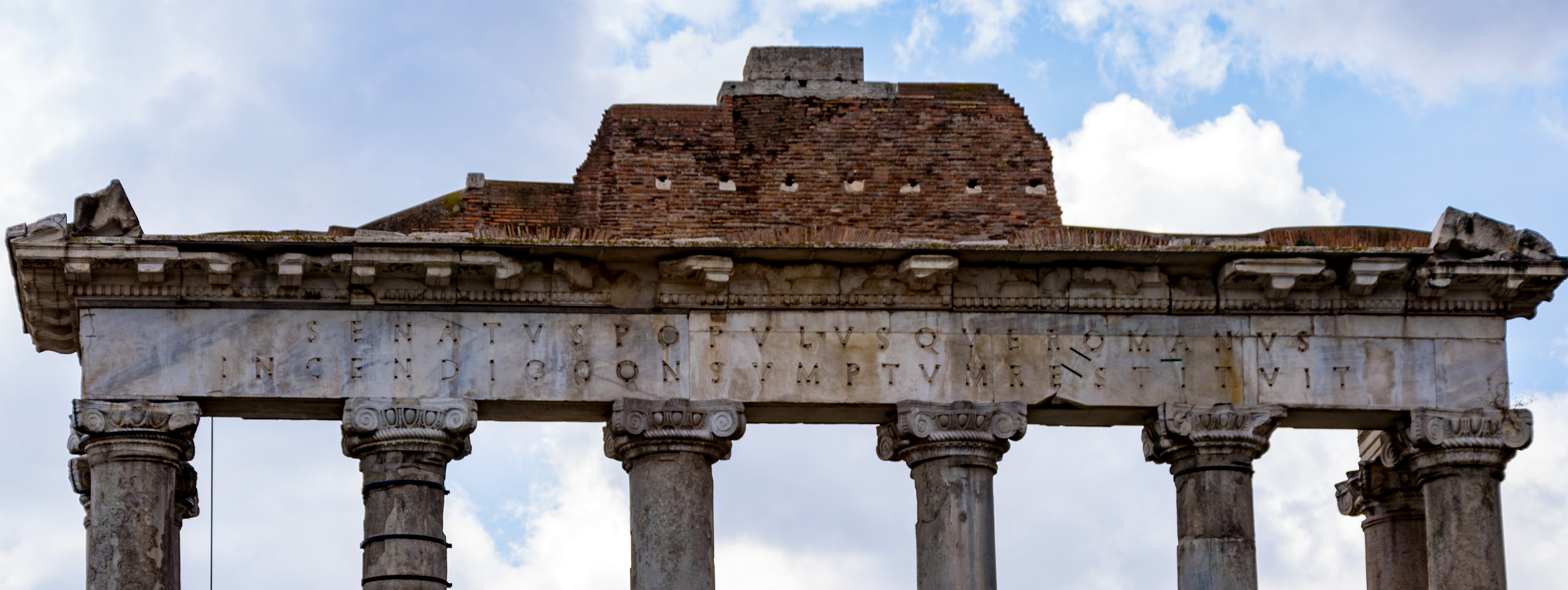 Detailansicht der Inschrift auf dem erhaltenen Architrav der Vorhalle des Saturntempels